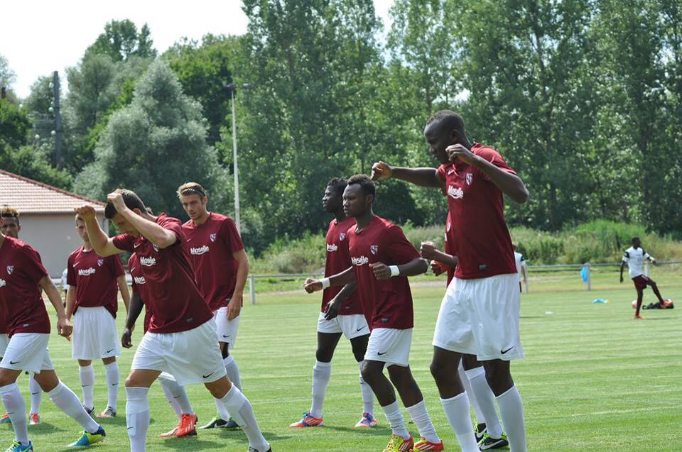 Désiré Sègbè Azankpo est né le 6 Mai 1993 au Bénin. Du haut de ses 21 ans, il est international béninois depuis le 17 Mai 2014. Ses prouesses techniques, ses conduites de balle, sa puissant athlétique, sa lourde frappe, sa pointe de vitesse phénoménale et ses passements de jambes hors pairs ont poussés le sélectionneur des Ecureuils du Bénin a lui confié la pointe de l’attaque de l’équipe nationale du Bénin.